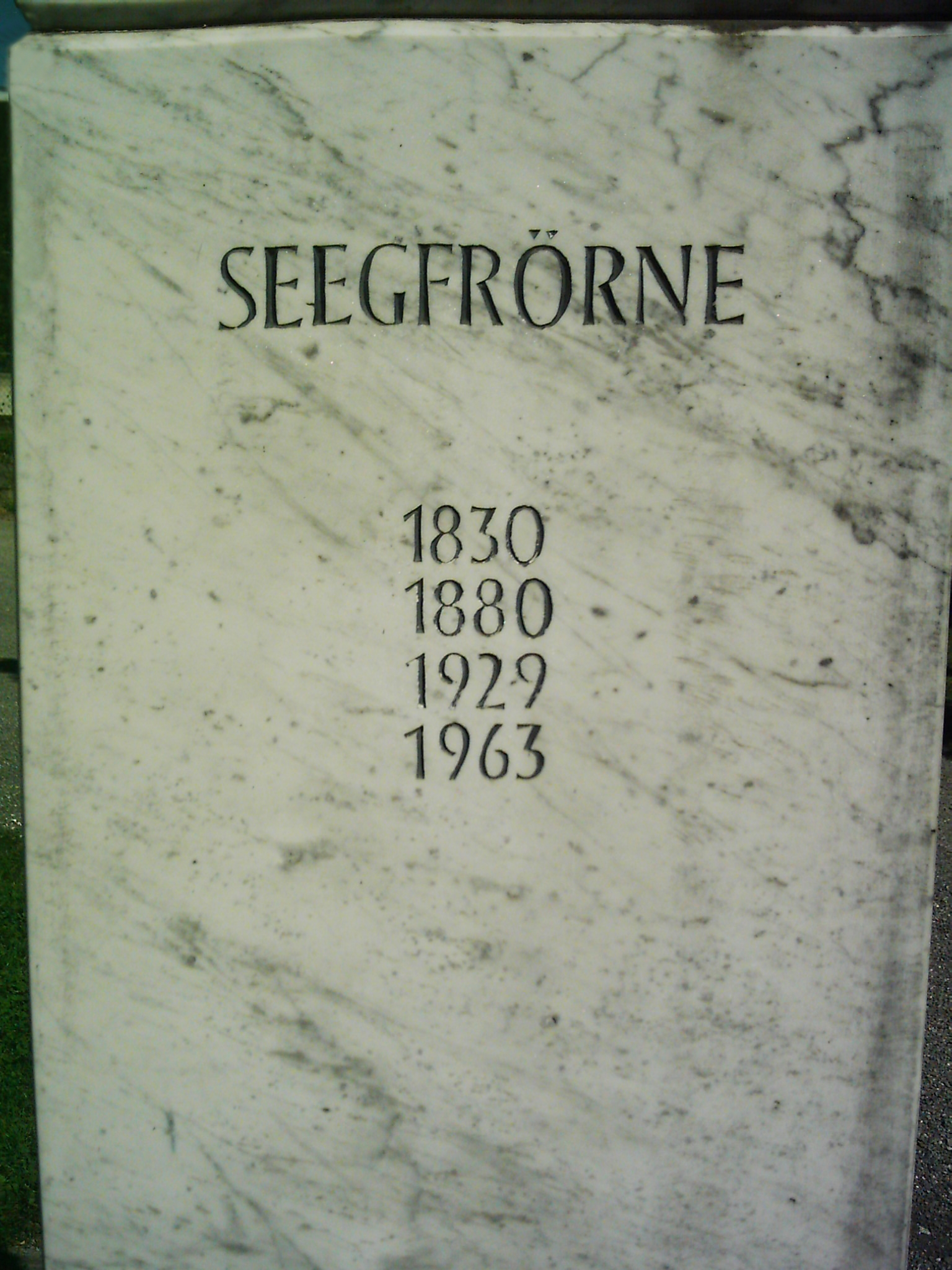 Grenzstein, Landmarke im Strandbad Lochau-Hörbranz am Bodensee mit hinweis auf den Seegfrörne (Zugefrorener Bodensee)